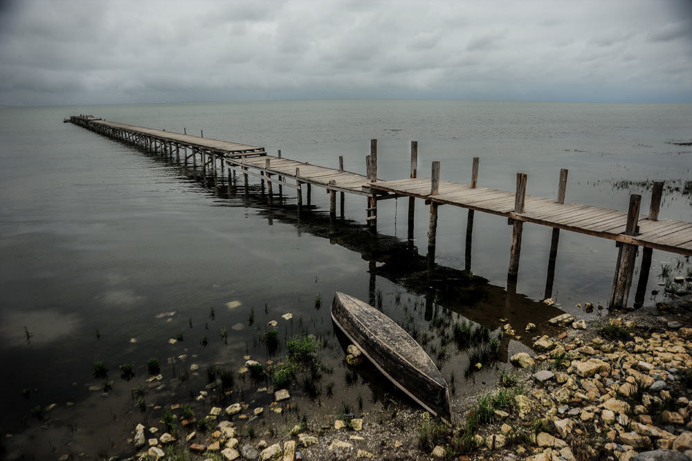 دریای خزر دریای بسته جهان است که از قسمت جنوبی شرقی خود یعنی خلیج گرگان در حال پسروی است و این مساله تا جایی پیش رفته است که اکنون به یک بحران برای منطقه تبدیل شده است. پسروی آب خلیج گرگان از سمت سواحل بندرترکمن و بندرگز در سال های گذشته آغاز شده است که همین علت باعث بوجود آمدن جزیره های متعددی در خلیج گرگان شده که حتی رفت و آمد قایق ها در این محل را مختل کرده و تبعات مختلفی برای منطقه و حتی کشور دارد که باعث ایجاد بحران های زیست محیطی ، اجتماعی و توسعه ای و حتی کوچ اجباری در پی دارد. معضل پسروی آب خزر به حدی است که کارشناسان هشدار داده اند اگر به عنوان یک اولویت محیط زیستی کشور برای آن تدابیر ویژه ای در نظر گرفته نشود، حادثه ای تلخ تر و حادتر از دریاچه ارومیه را در منطقه حاشیه خزر تجربه خواهیم کرد. ورود پساب های صنعتی از استان های همجوار و سیل های فصلی منتهی به خلیج گرگان و کاهش سطح آب باعث افزایش غلظت و میزان آلایندگی ها شده تا جایی که مرگ موجودات خلیج را رقم زده است. از سوی دیگر ماهیان خاویار، تنها گونه جانوری باز مانده از عصر یخبندان است و به عنوان فسیل زنده شناخته می شود که زیستگاه و بهترین محل تخم ریزی در دریای خزر را از دست داده و باعث انقراض آن شده و علاوه بر ایجاد یک معضل زیست محیطی باعث ایجاد مشکلات اقتصادی برای ساکنان حاشیه خزر شده است به گونه ای که حتی برنامه های اقتصادی استان در این حوزه را هم با چالش رو به رو کرده است. از سوی دیگر این بحران به برنامه های توسعه ای گلستان که برپایه گردشگری دریایی مستقر بوده هم آسیب زده و عملا باعث شده بسیاری از طرح ها از جمله طرح گردشگری آشوراده تحت شعاع این بحران قرار بگیرد.کارشناسان و مسئولان با تشکیل کمیته بحران در سطح استانی و ملی درحال بررسی راهکارهای موجود برای حل این بحران هستند.